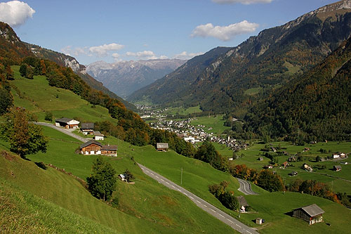 Blick nach Linthal (mit Klausenpassstrasse)